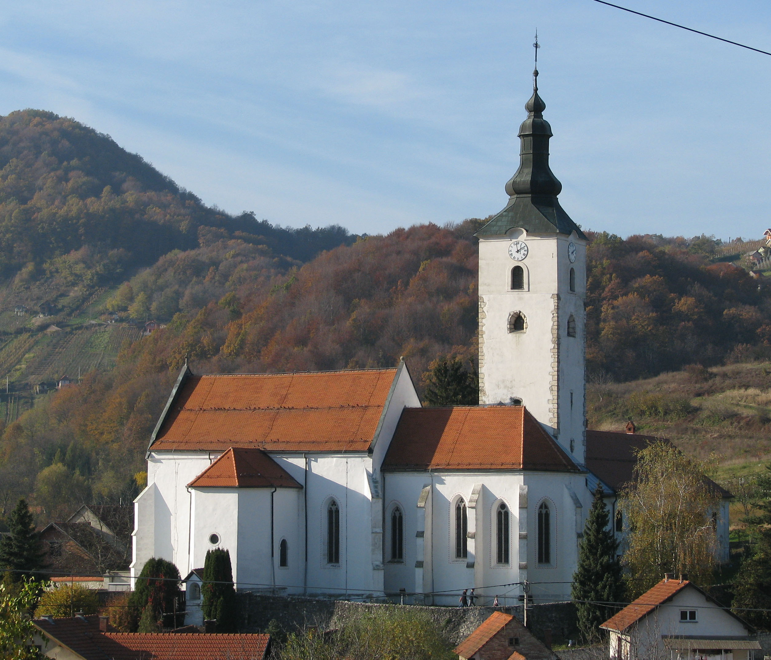 Crkva Blažene Djevice Marije Sv. Krunice u Remetincu, pokraj Novog Marofa, Varaždinska županija, RH